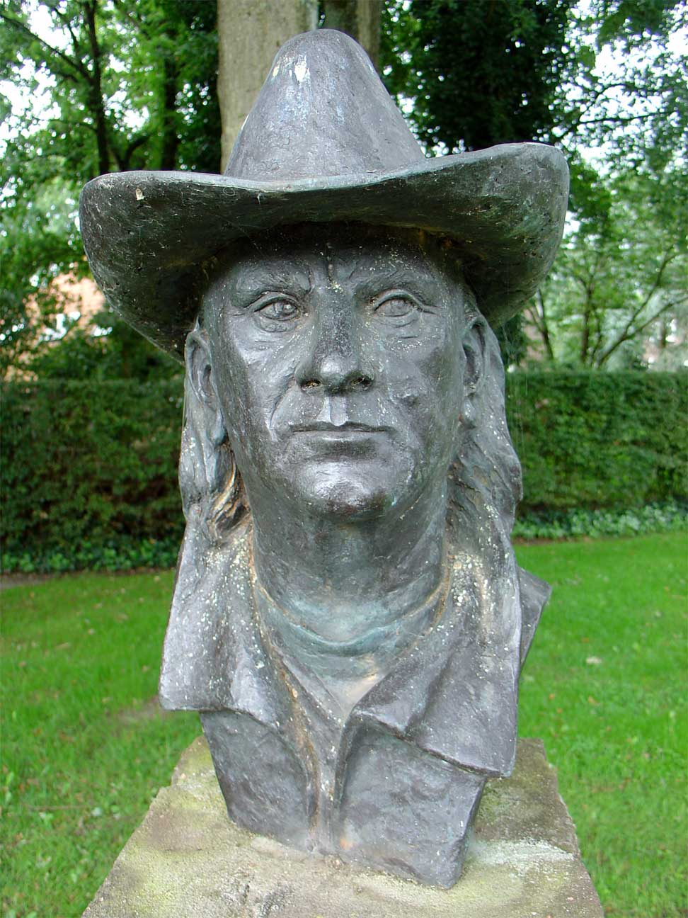 "Harry Muskee" standbeeld op de hoek Hoofdstraat/Voorstreek in Grolloo, beeldhouwer Gerda van den Bosch